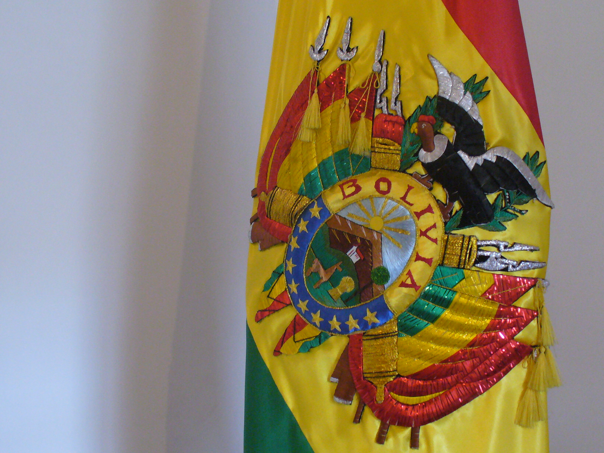 vista parcial de la Bandera oficial de Bolivia